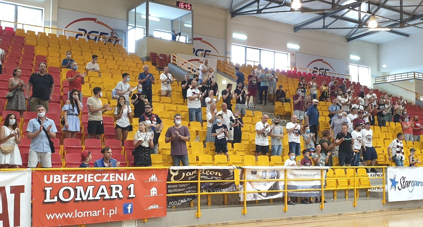 Stargard, 08.08.2020. Kibice PGE Spójni